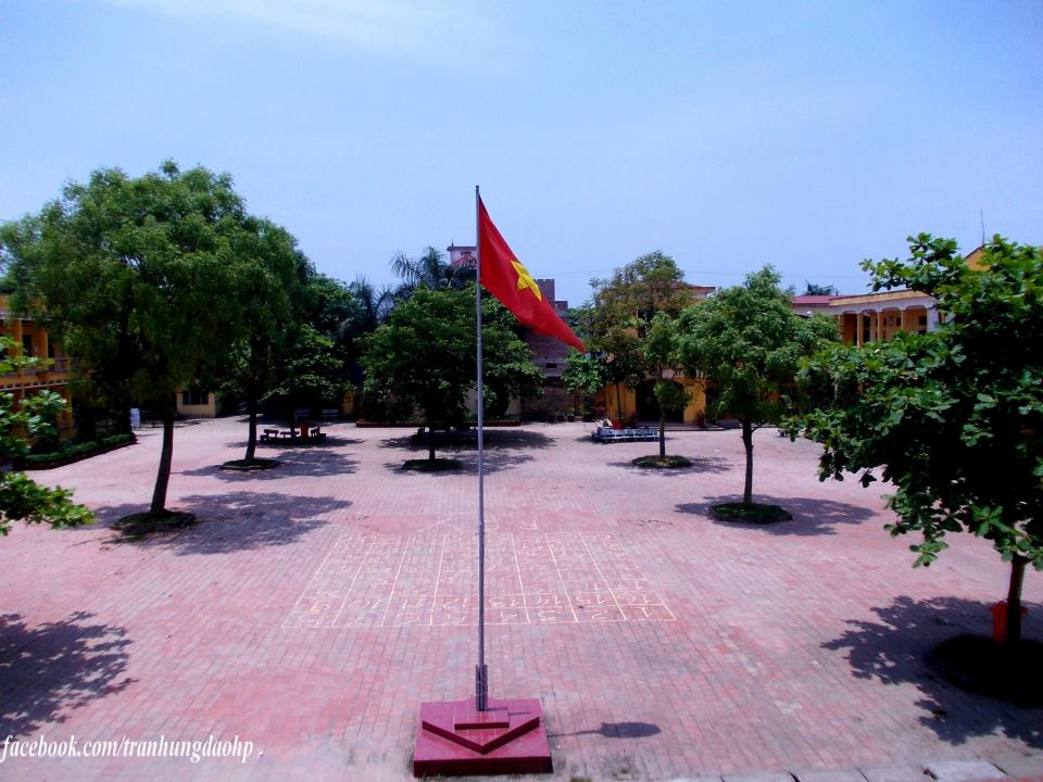 Khung cảnh trường THPT Trần Hưng Đạo, Hải Phòng